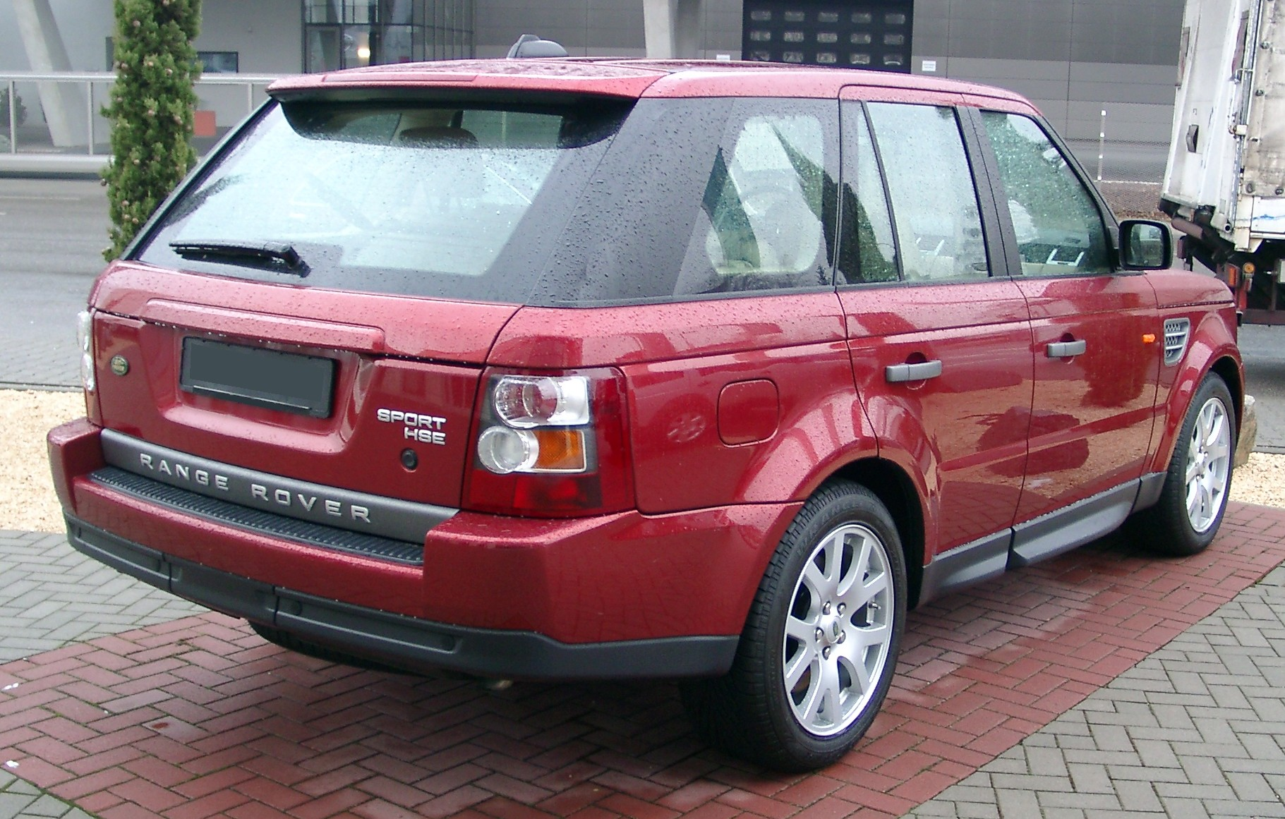 Range Rover Sport